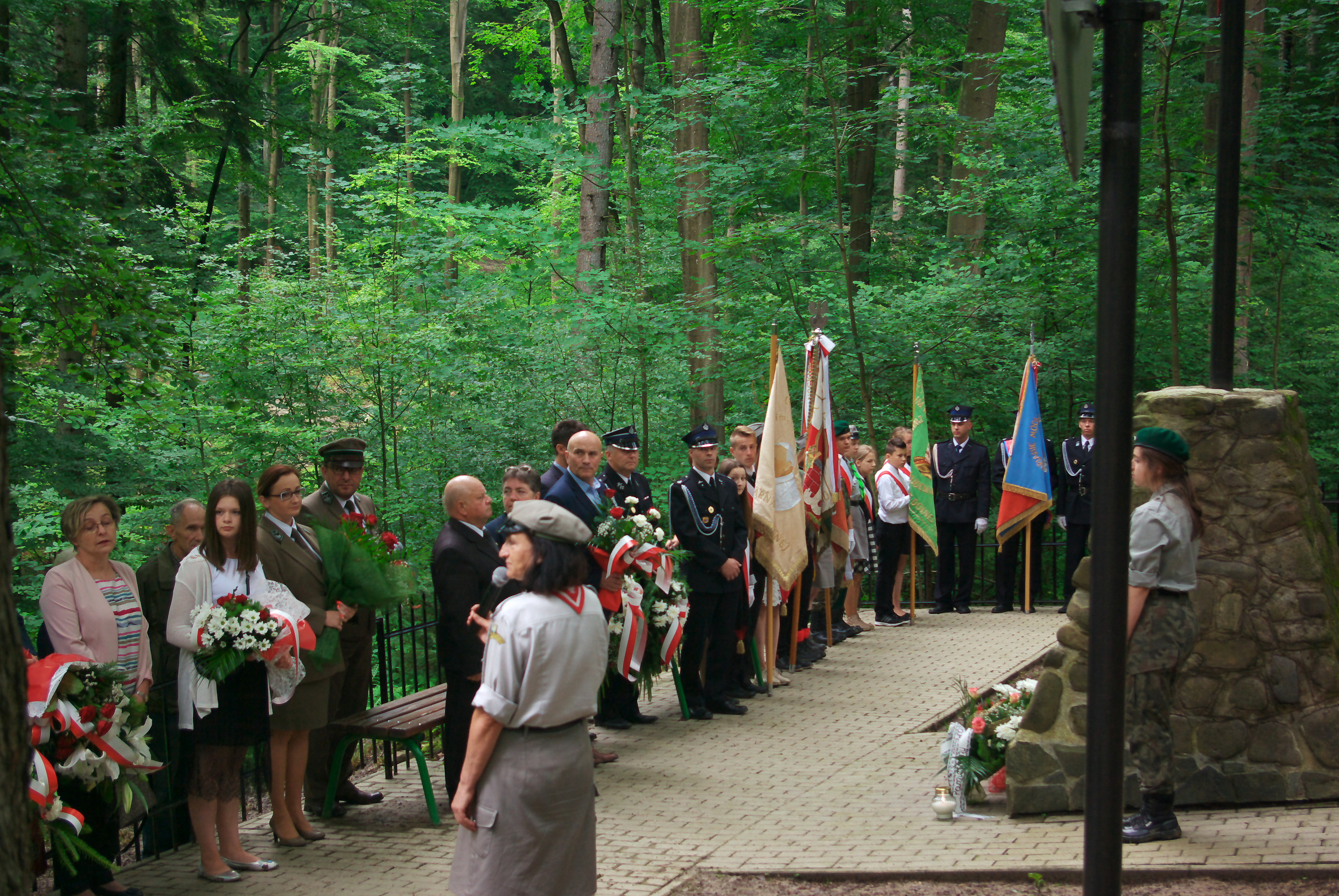 Uroczystości 77. rocznicy egzekucji na górze Gruszka z 1940 roku (7 czerwca 2017).